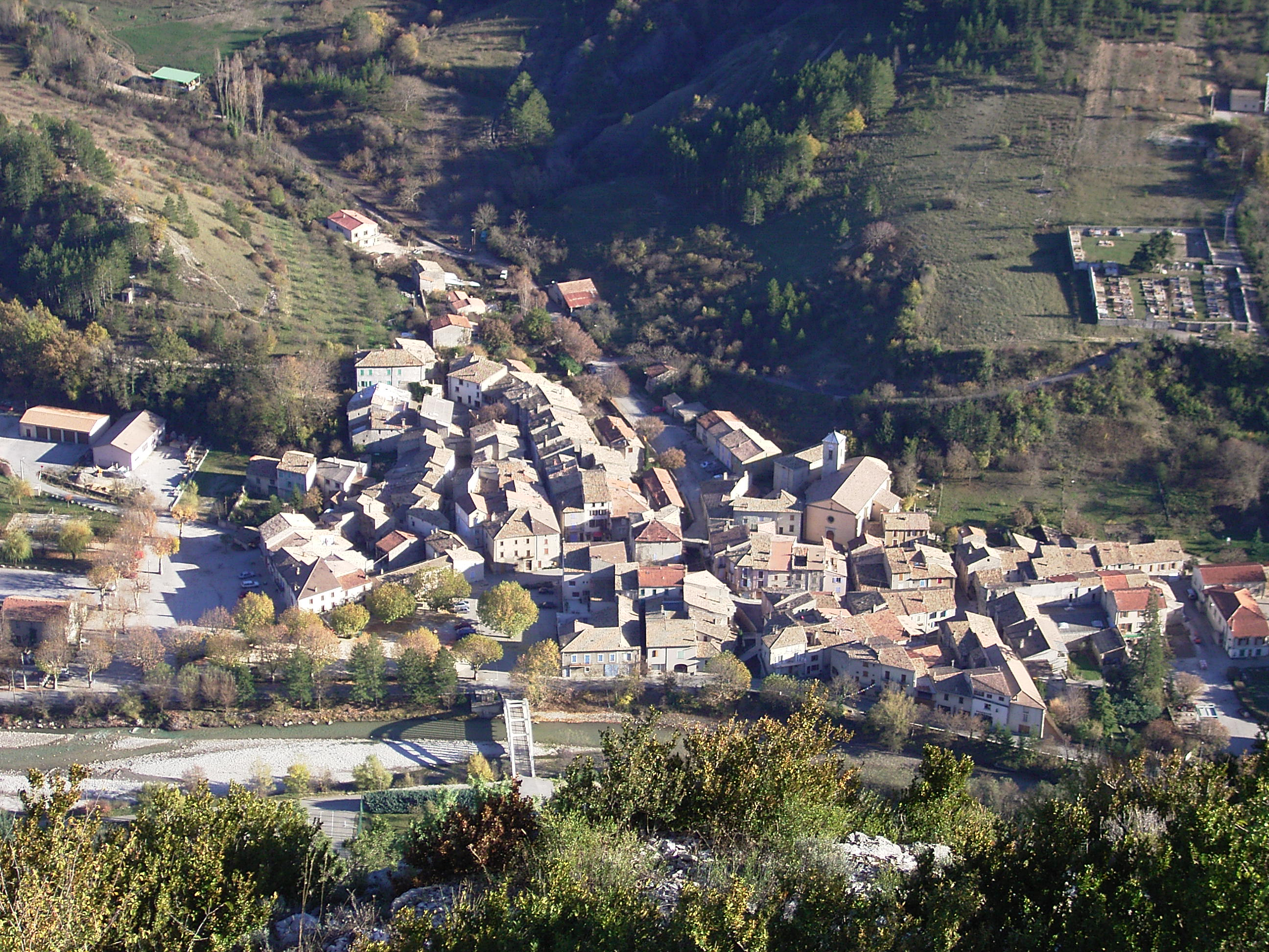 village de Rémuzat vu du rocher du Caire